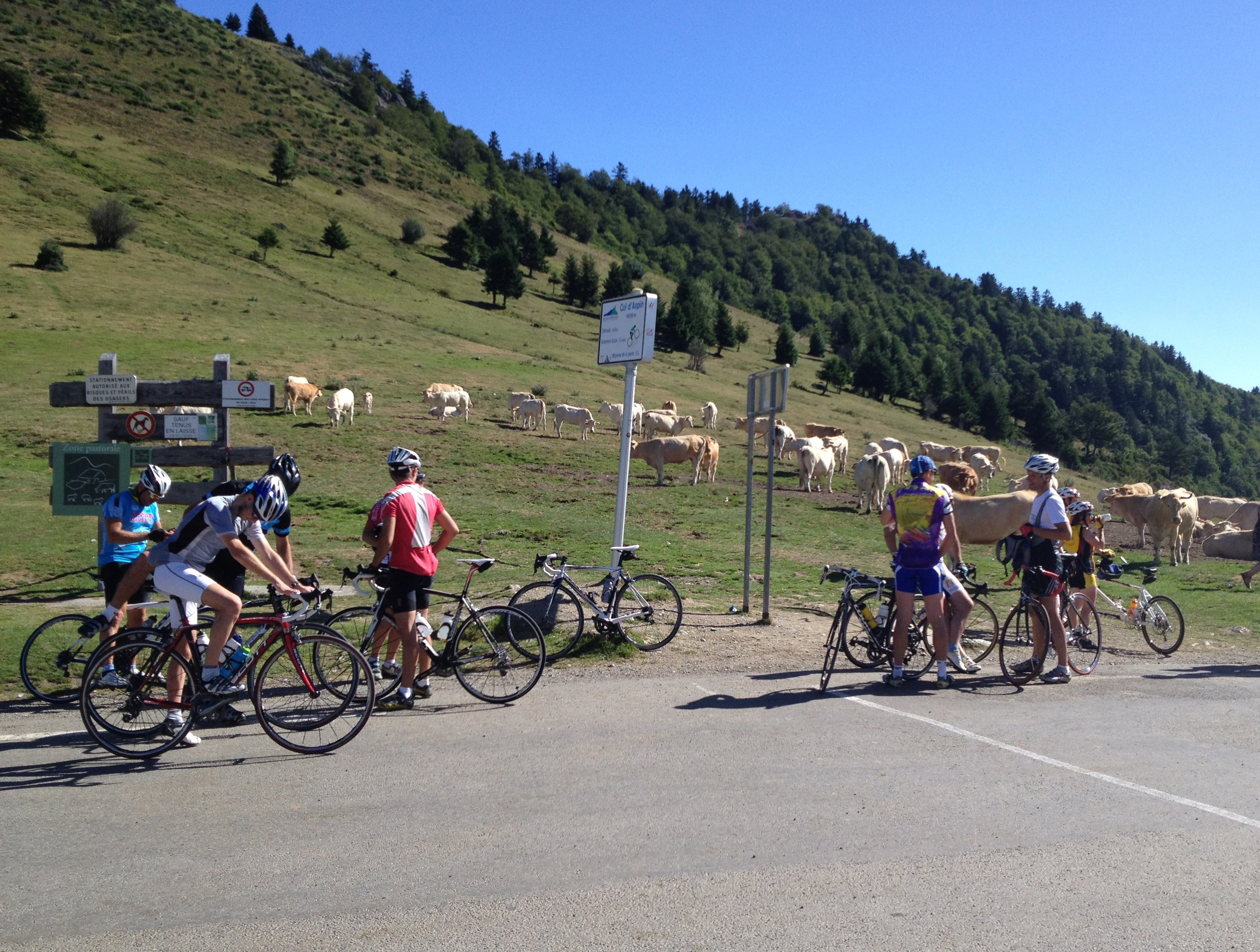 En haut du col dans les Pyrénées.